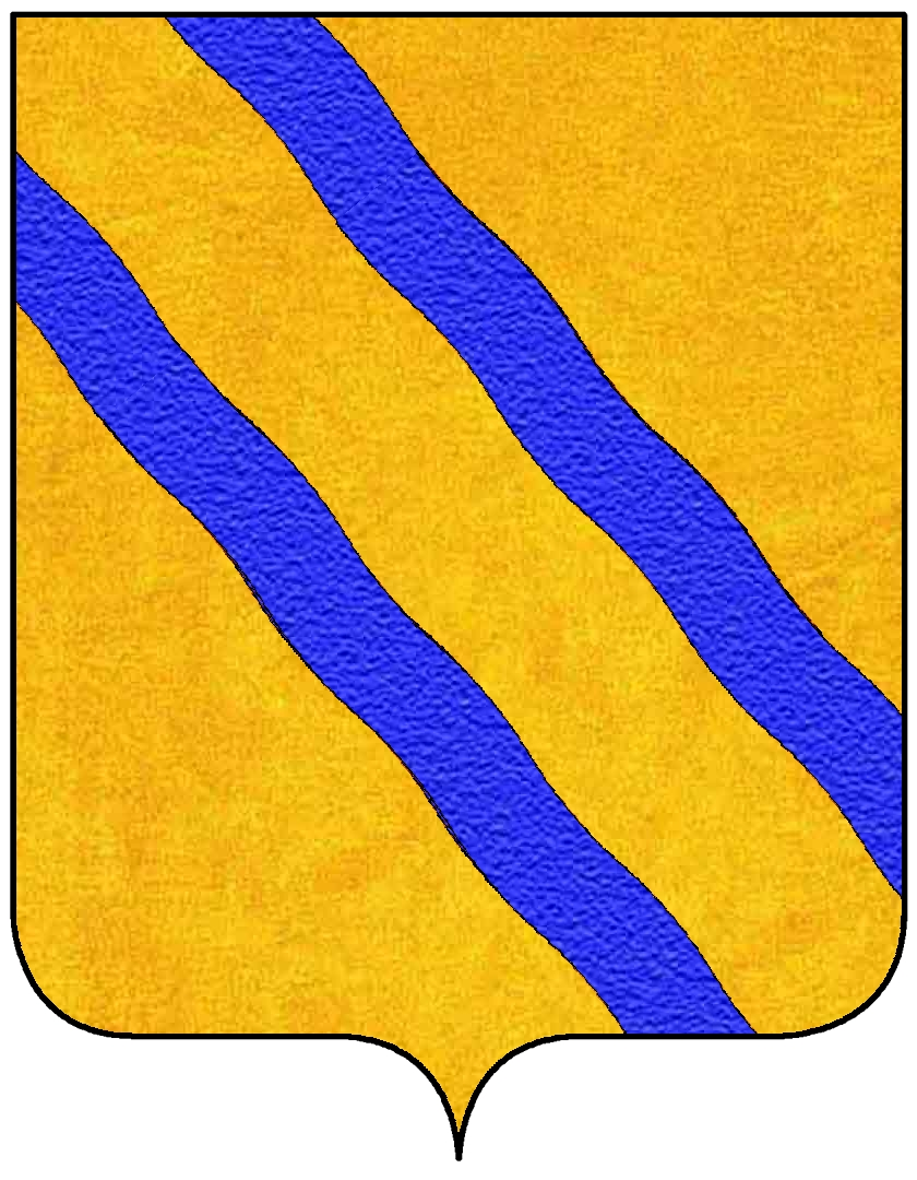 Stemma della famiglia Gaetani